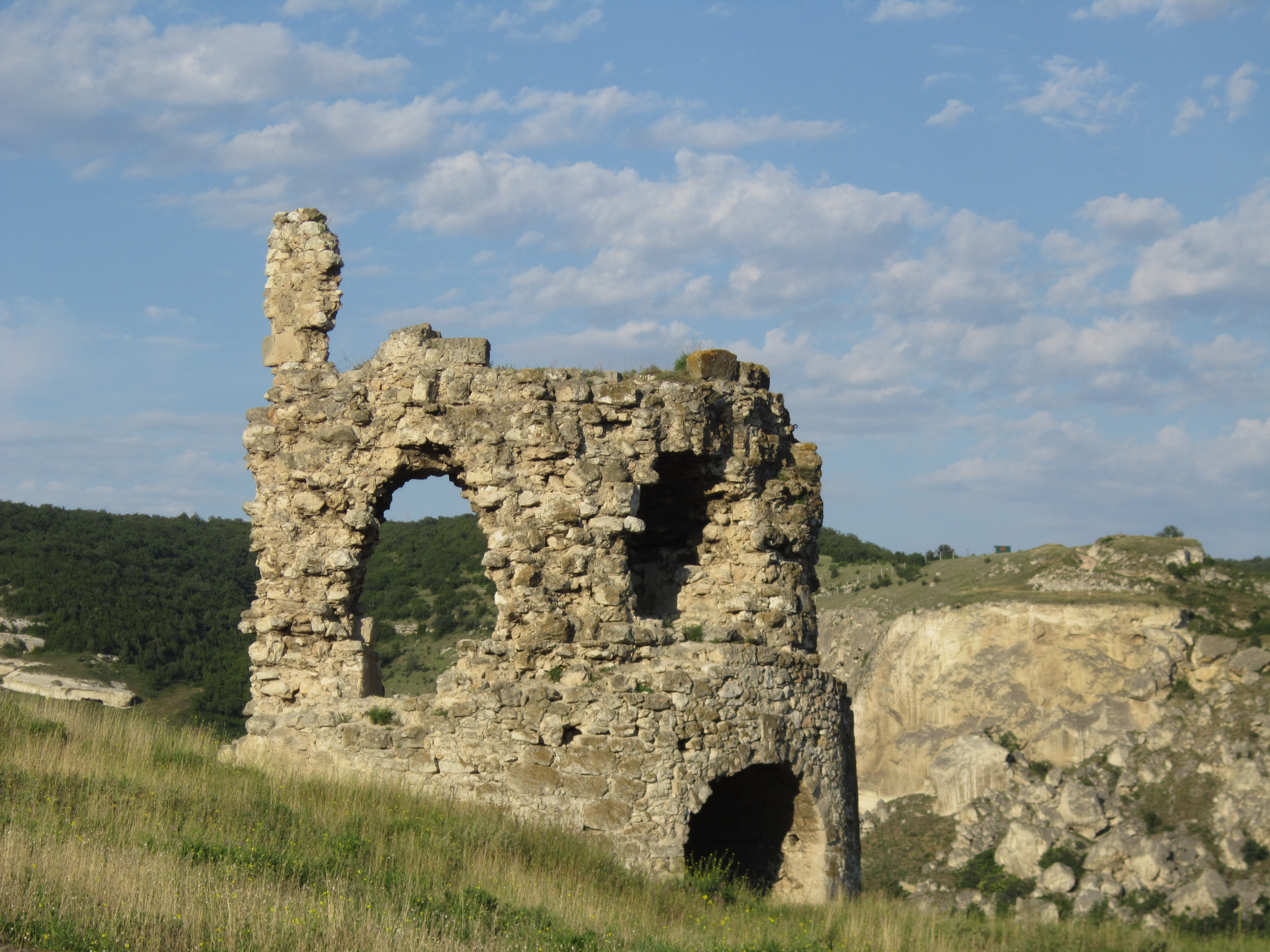 Фортеця Каламіта, м. Інкерман